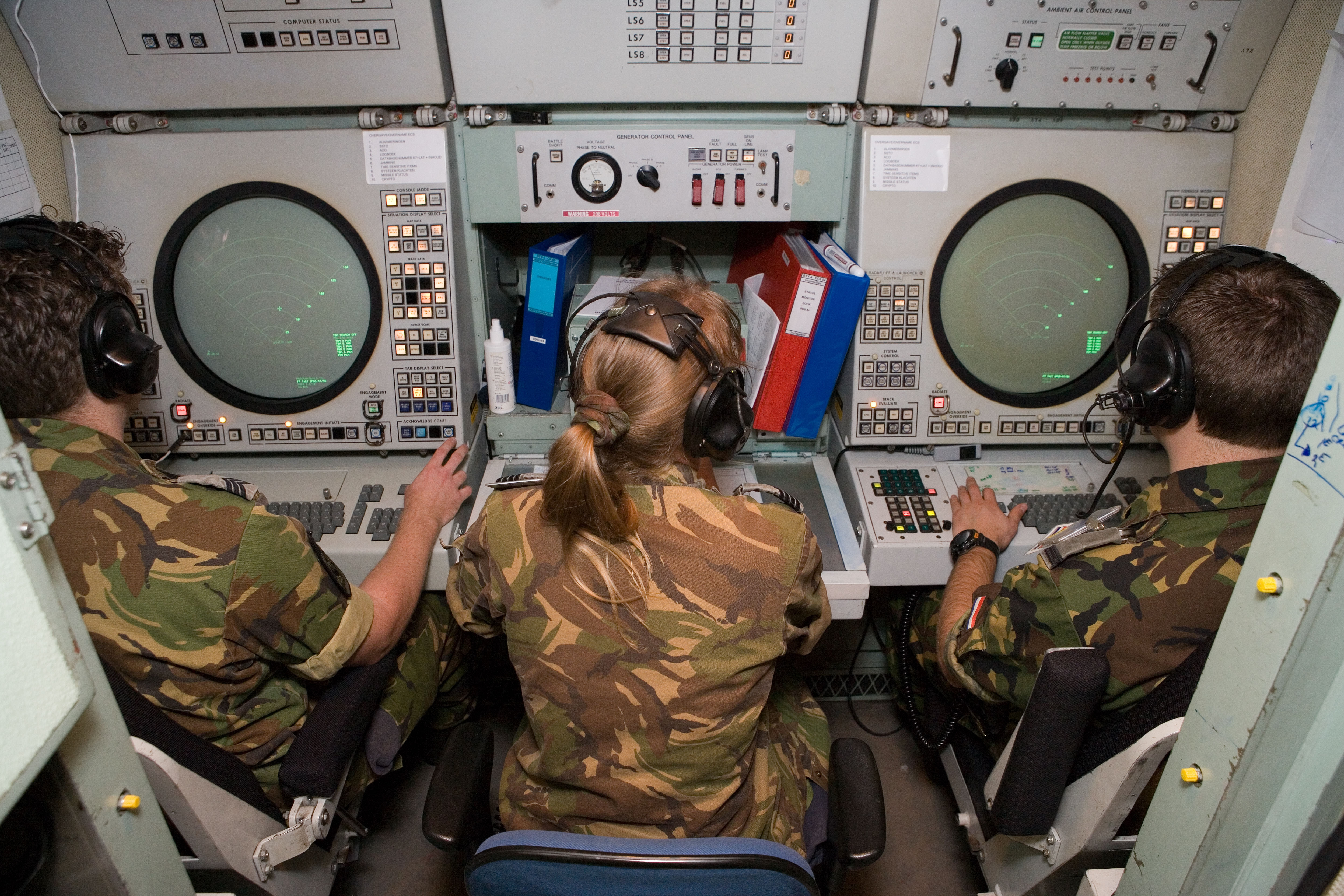 Communicateisysteem van de Patriot